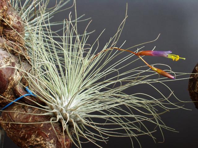 Tillandsia fuchsii var. fuchsii forma gracilis W. Till, 1990 in der Kultur (in der Literatur vor 1990 wird sie als T. argentea beschrieben)